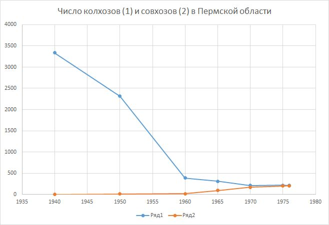 Колхозы и совхозы в Пермской области, Россия